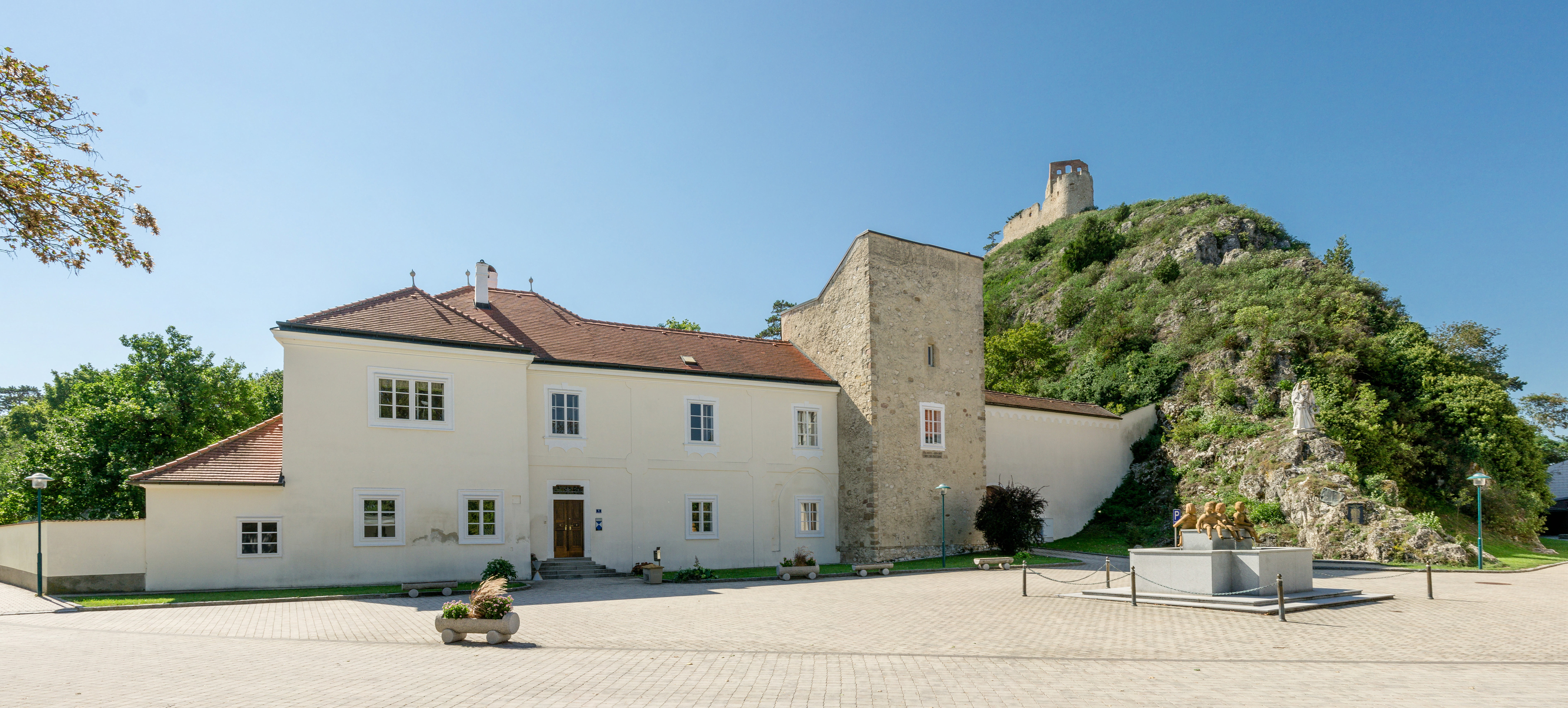 Pfarrhof